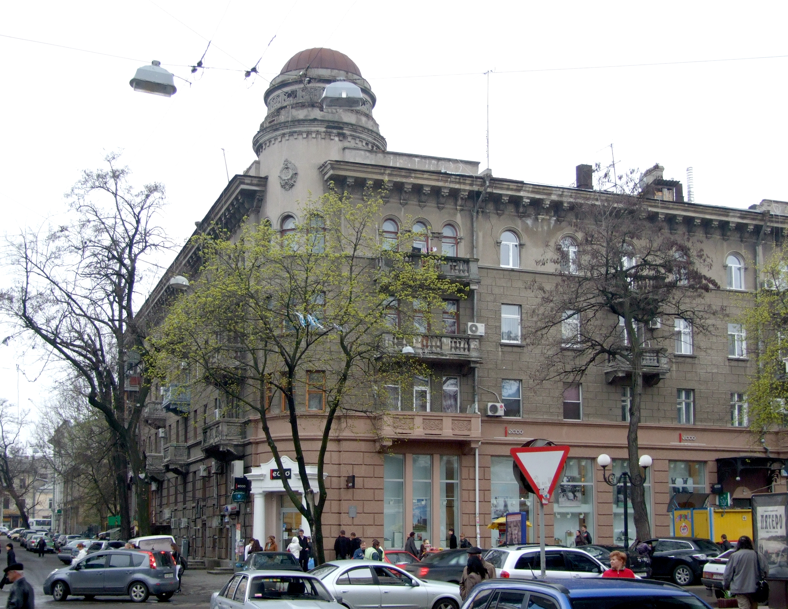 Будинок житловий, в якому жив у 1954-1957 рр. Г.В. Жуков - віце-адмірал, командуючий Одеським оборонним районом